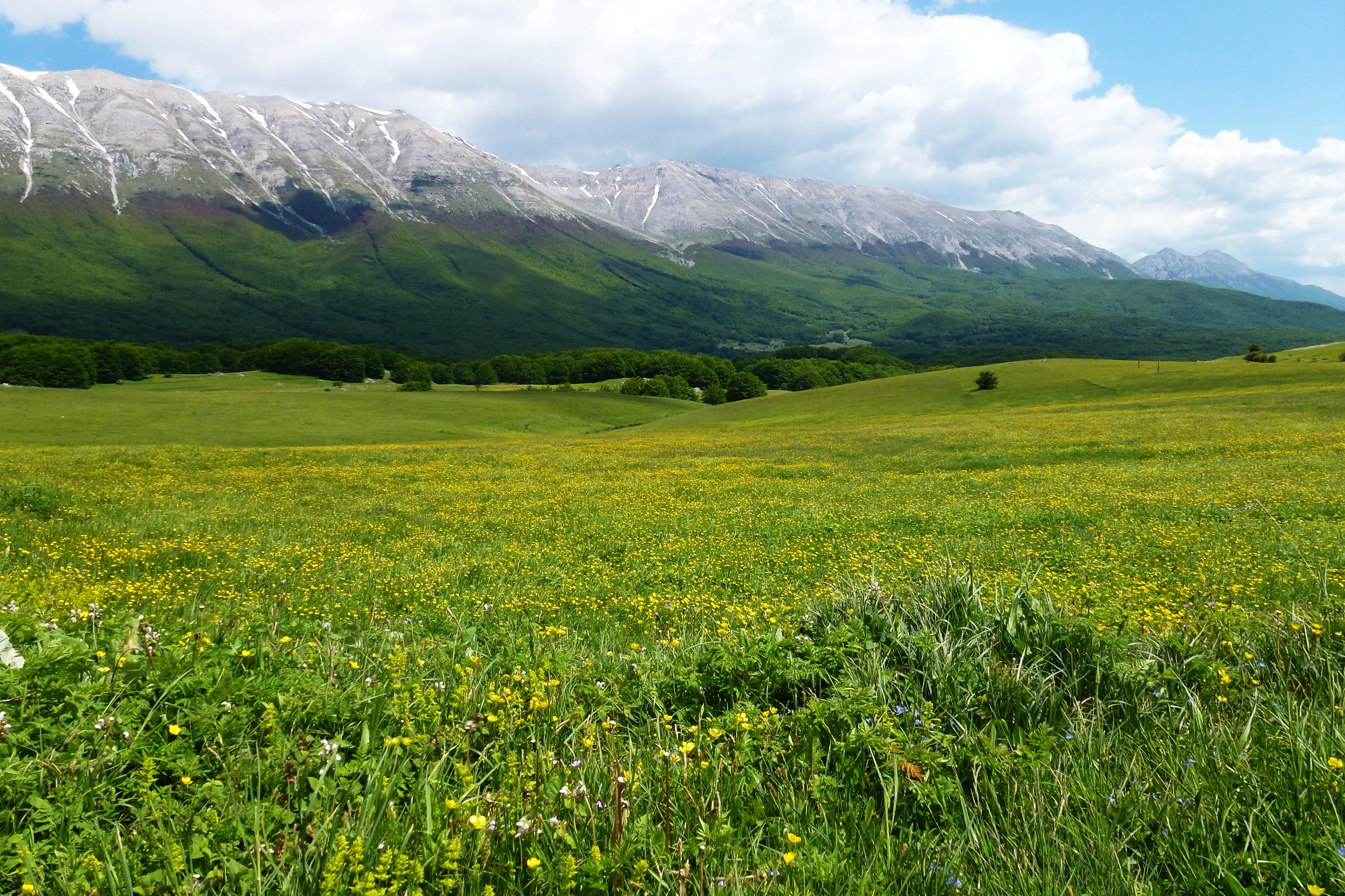 Prateria sul Passo San Leonardo